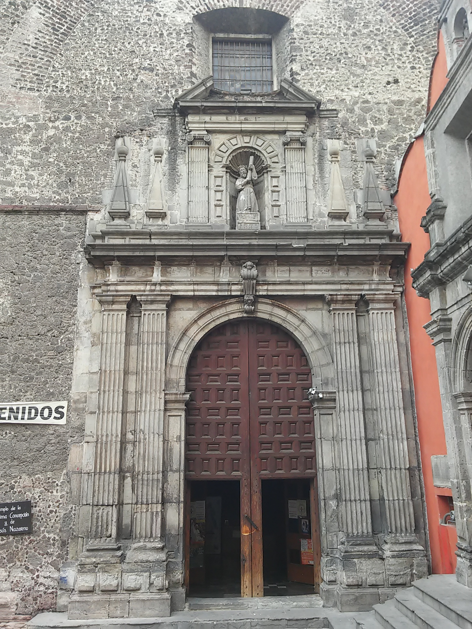 Fachada del templo de Jesús Nazareno, que perteneció a la primitiva catedral de México, demolida en 1625